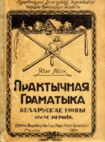 Okładka książki "Praktycznaja hramatyka biełaruskaje mowy 1" autorstwa Jazepa Losika.